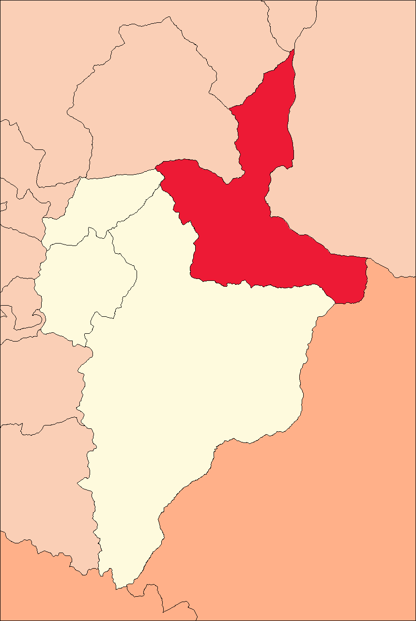 Área del distrito de Chaglla.